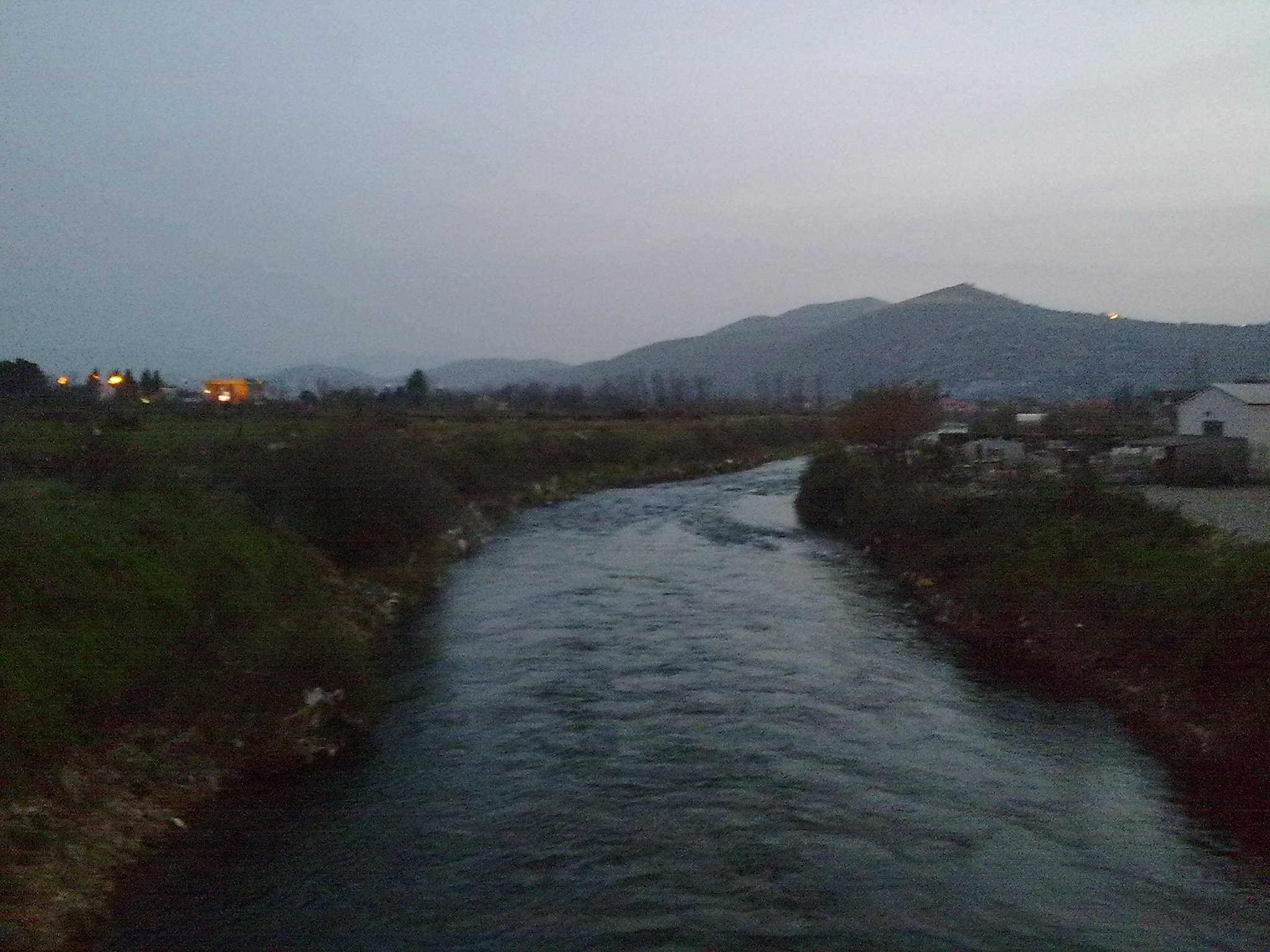 Farmaci, Montenegro